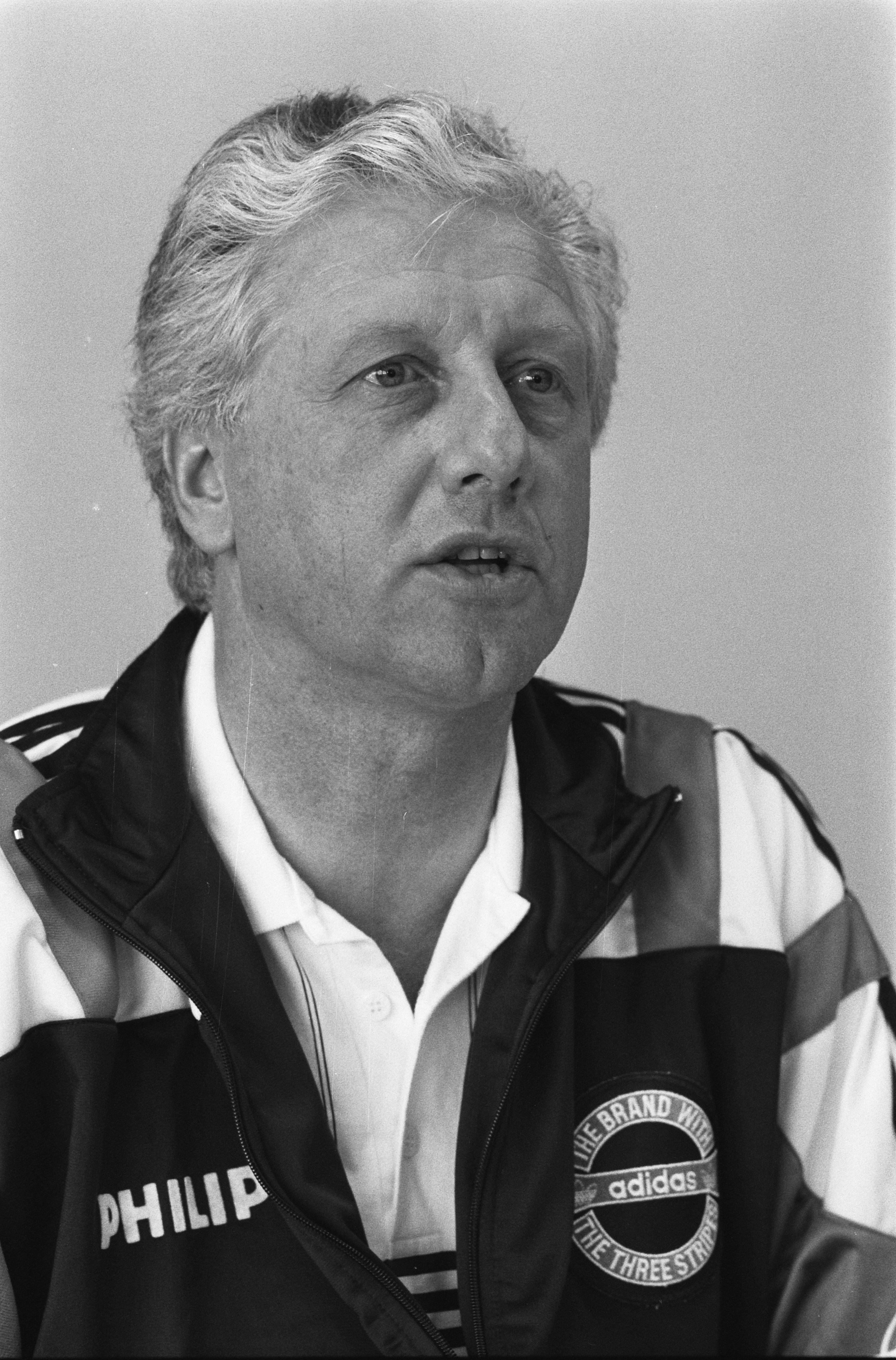 Collectie / Archief : Fotocollectie Anefo Reportage / Serie : Selectie Nederlands elftal bijeen in Noordwijk Beschrijving : Bondscoach Thijs Libregts Datum : 21 april 1989 Locatie : Noordwijk, Zuid-Holland Trefwoorden : portretten, sport, trainers, voetbal Instellingsnaam : Libregts, T. Fotograaf : Croes, Rob C. / Anefo Auteursrechthebbende : Nationaal Archief Materiaalsoort : Negatief (zwart/wit) Nummer archiefinventaris : bekijk toegang 2.24.01.05 Bestanddeelnummer : 934-4425